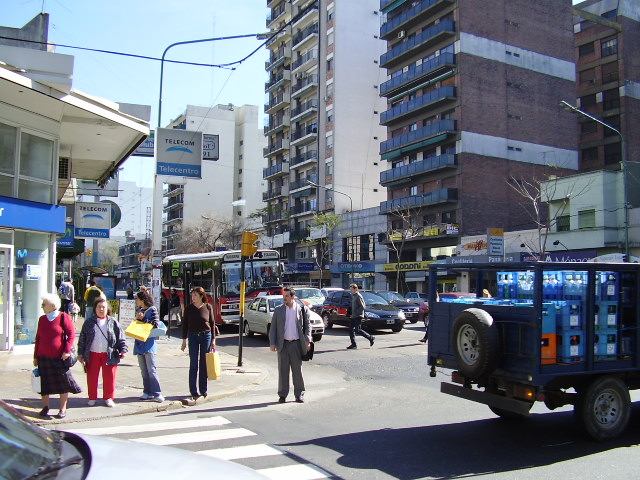 Intersección de las avenidas Ugarte y Maipu, Olivos